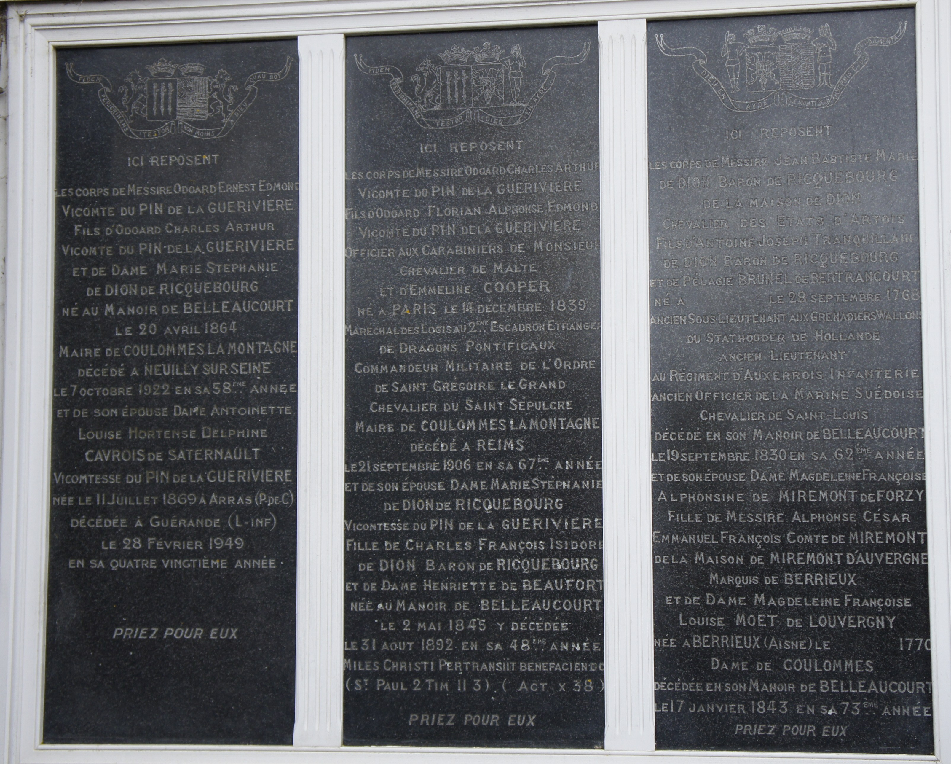 Plaques de la famille du Pin de la Guérivière au cimetière municipal.